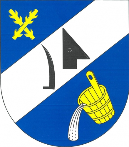 znak, Jiratice, okres Třebíč